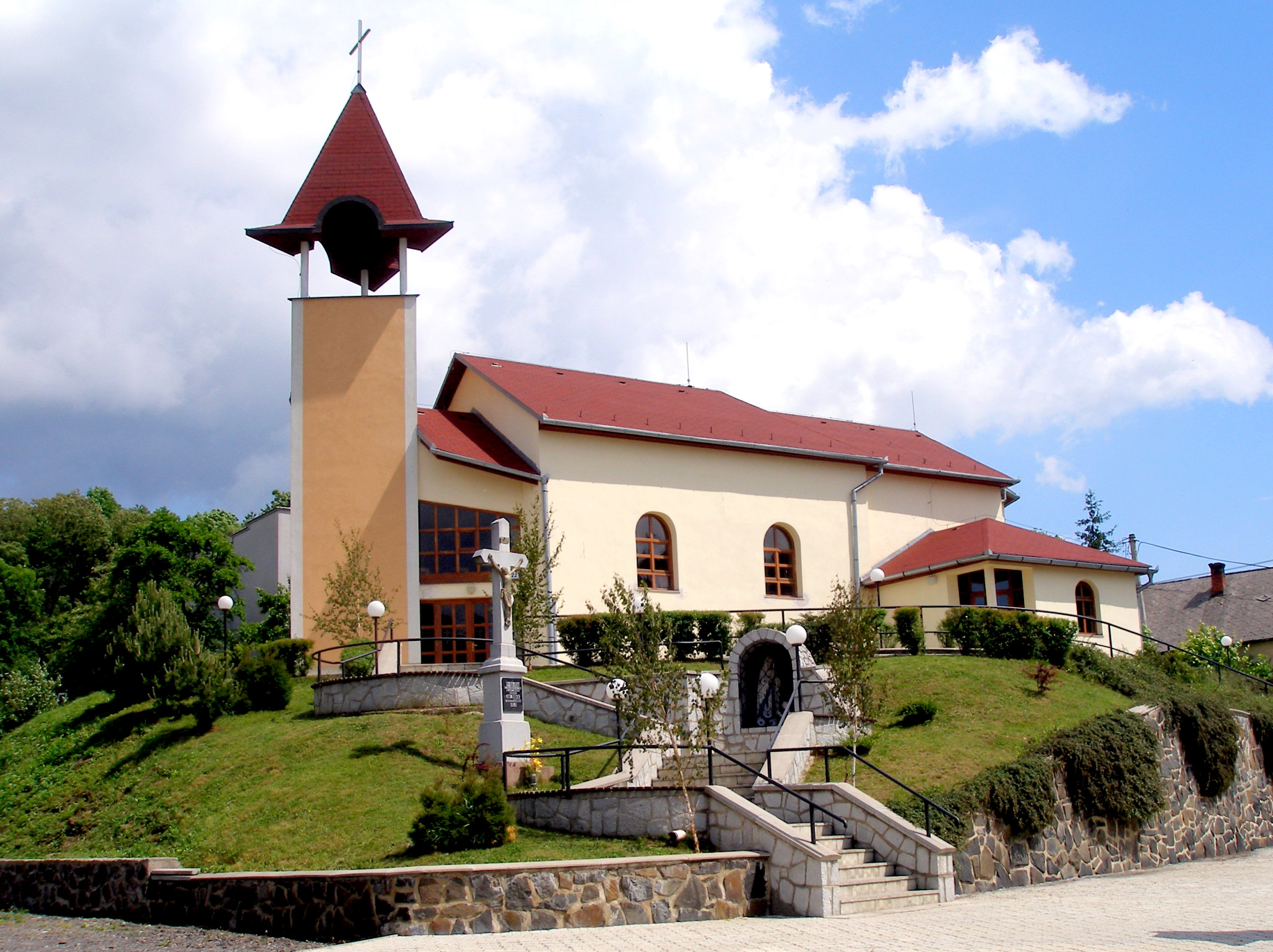 Obec Šarišské Sokolovce okres Sabinov